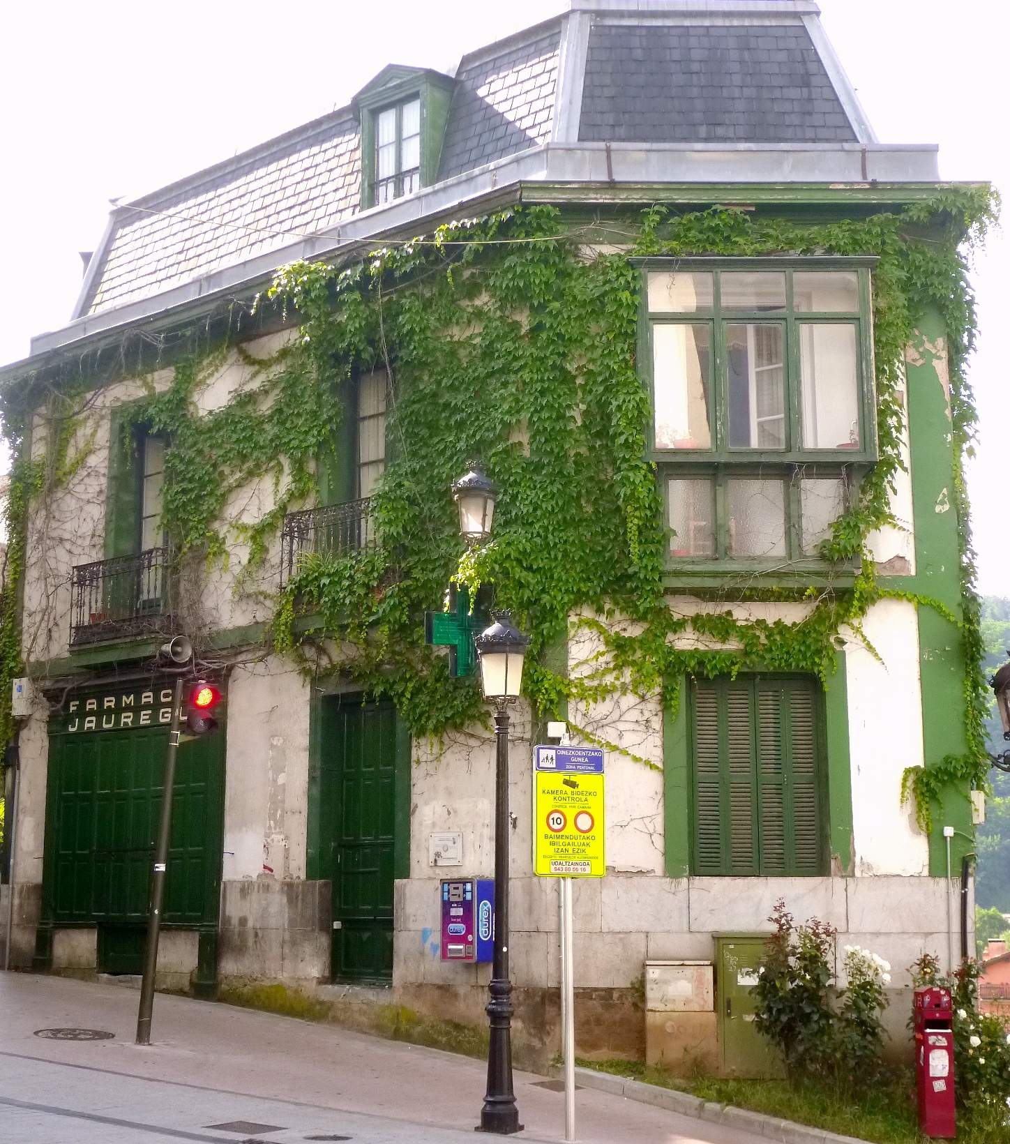 Ordizia (Guipúzcoa)